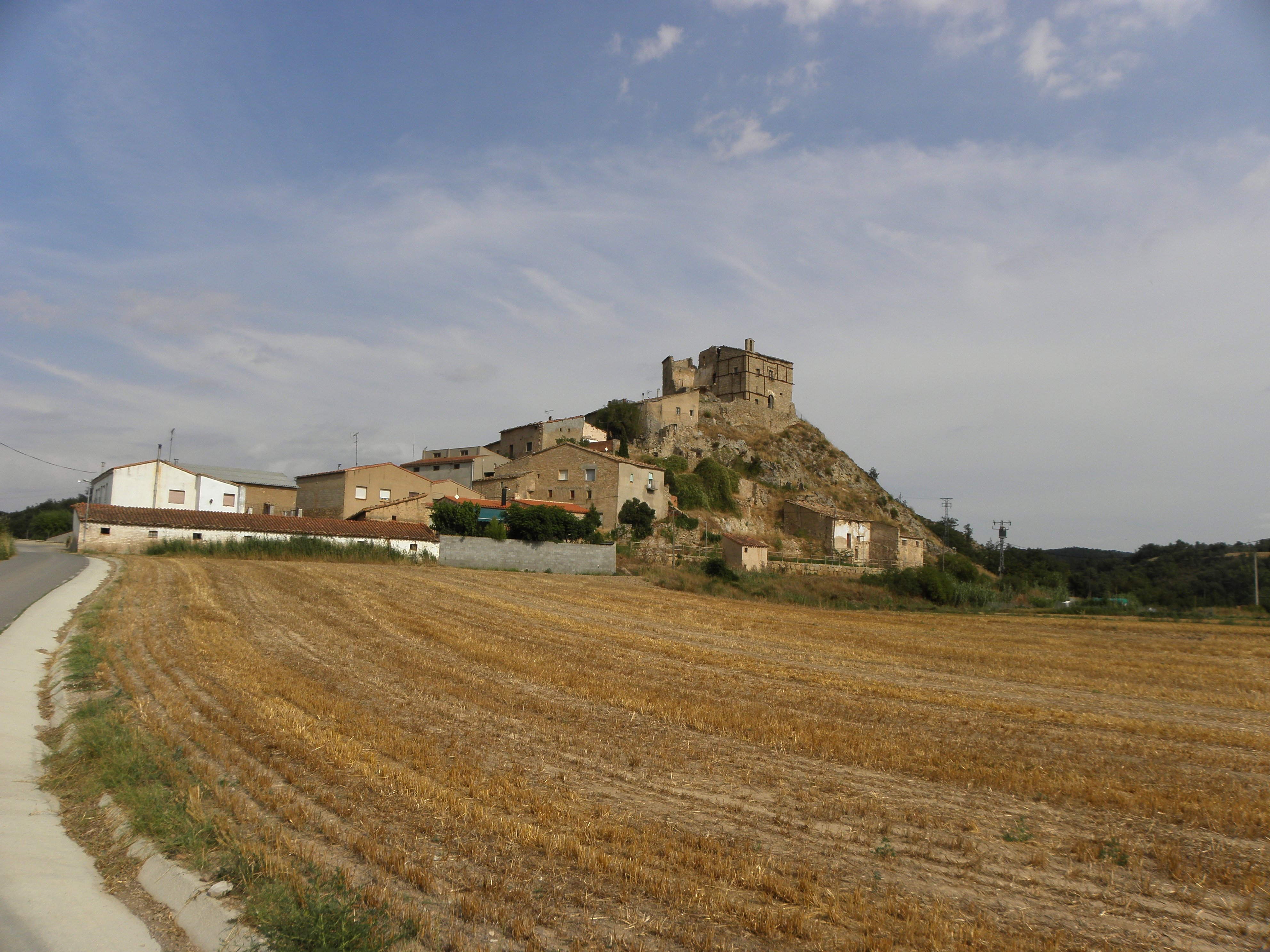 El nucli d'Enfesta (La Molsosa, Solsonès) amb el castell dalt del turó